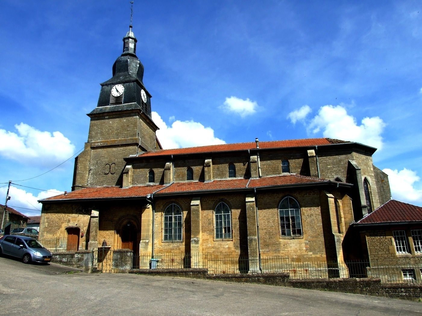 Église Saint-Maurice d'Arrancy-sur-Crusne (Inscrit) .